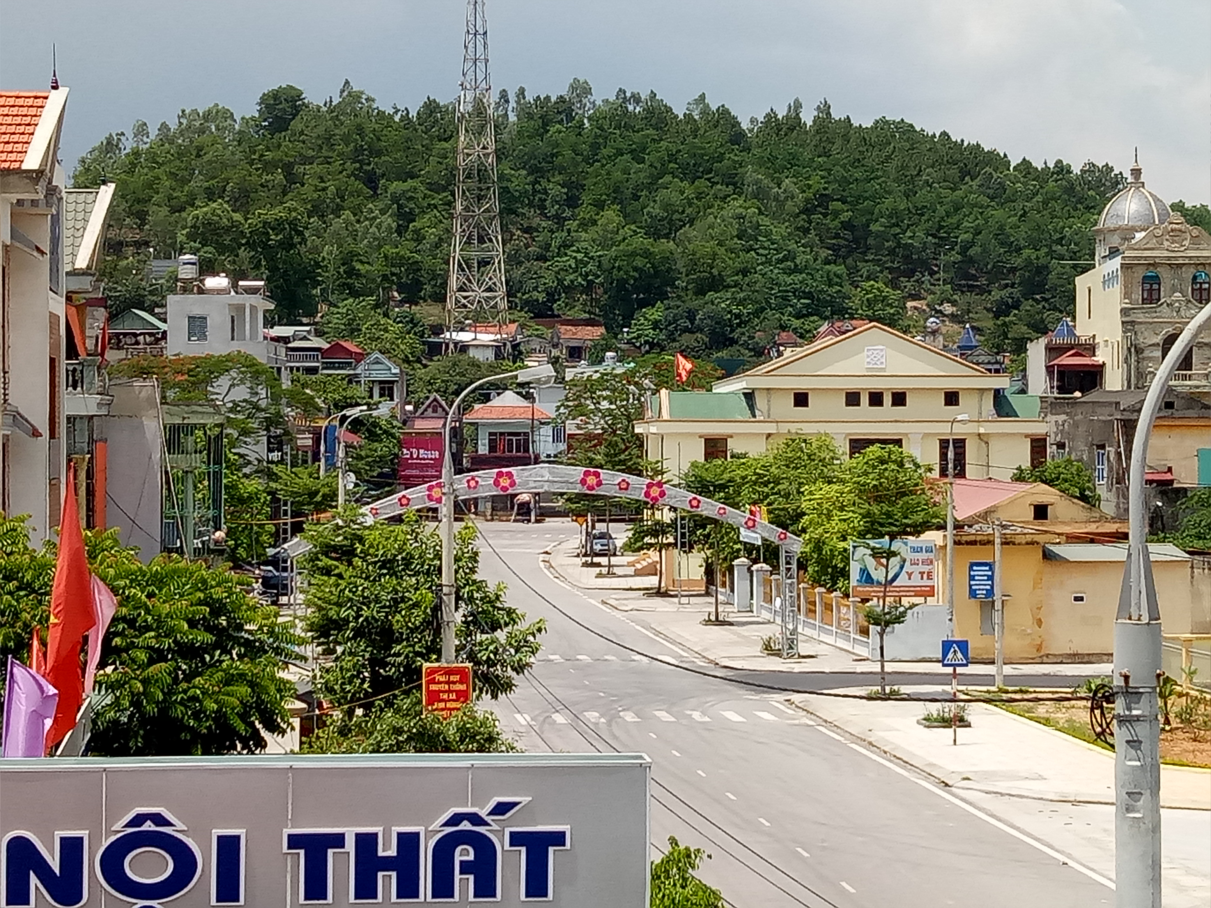 Một góc phường Đông Triều